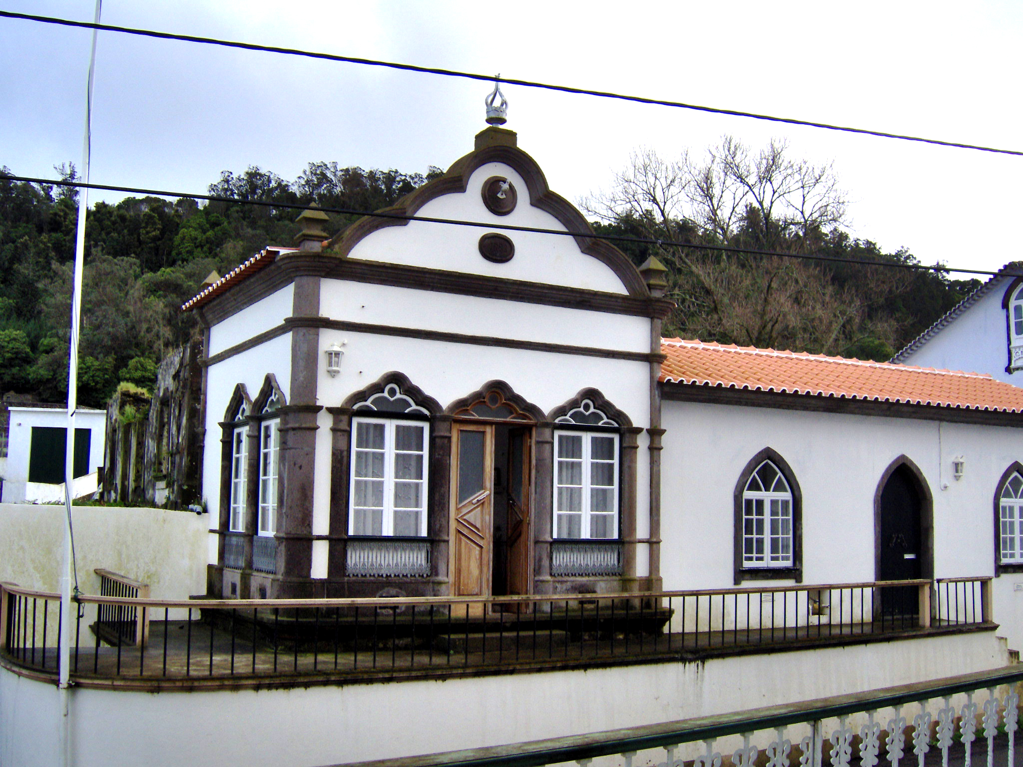 Império do Espírito Santo das Fontinhas, Praia da Vitória, ilha Terceira, Açores